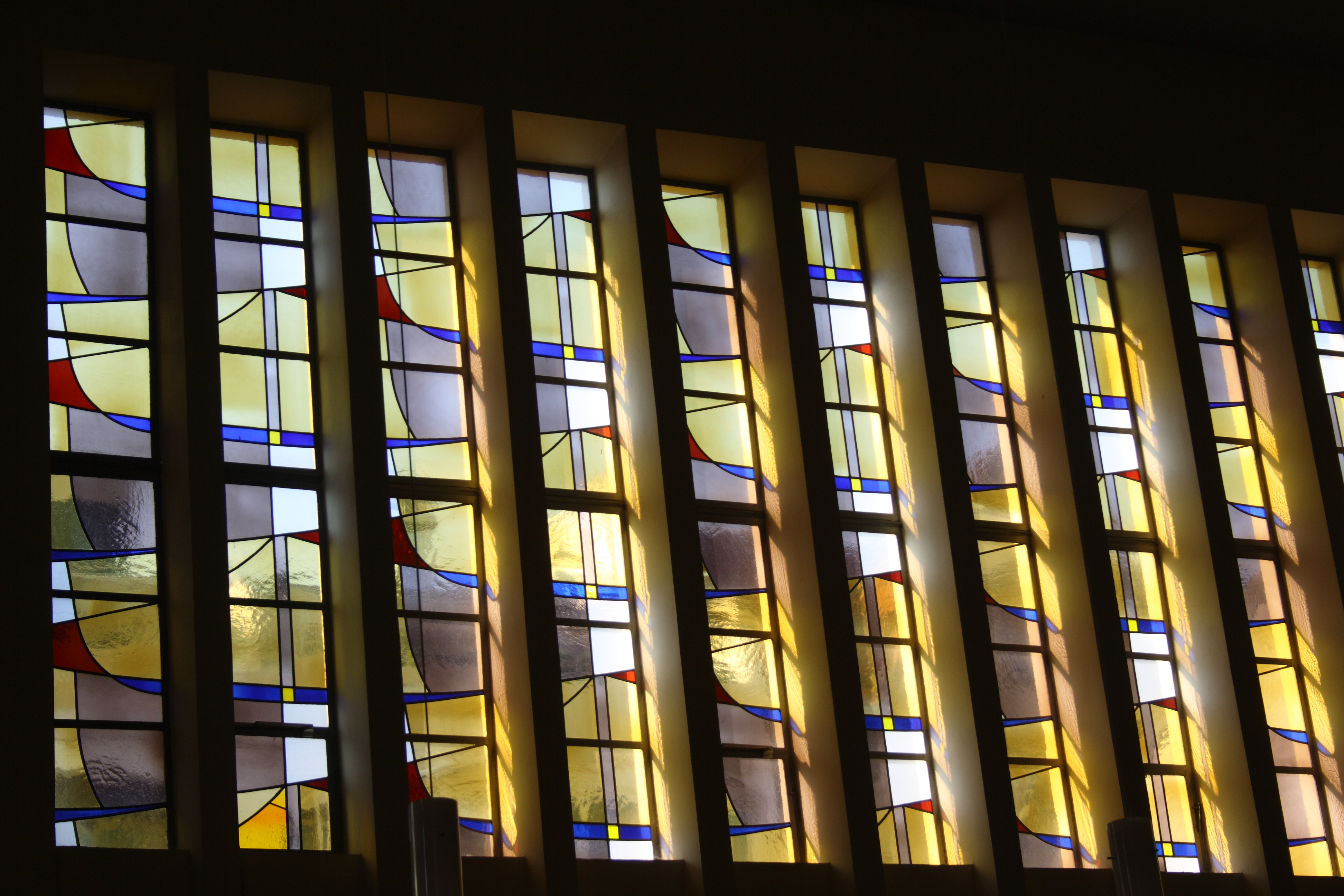 Bleiglasfenster in der Lutherkirche in Bad Neuenahr